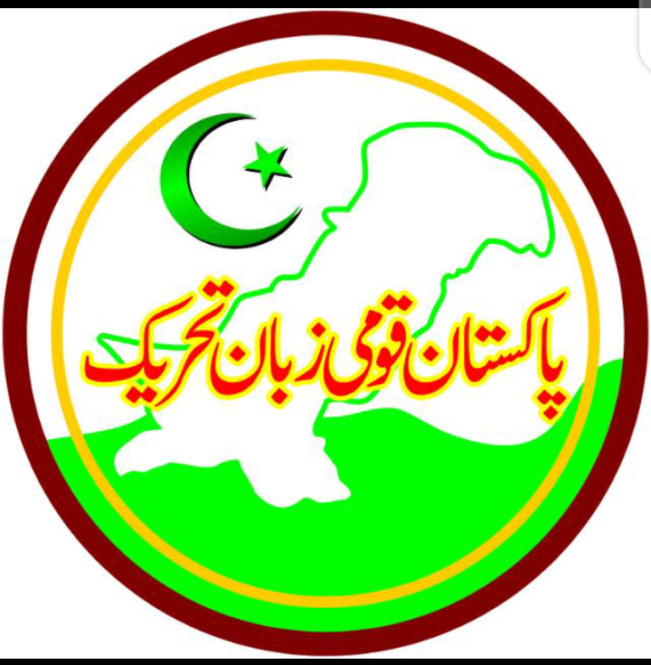 پاکستان قومی زبان تحریک ایک رجسٹرڈ تنظیم ہے۔ جو پاکستان میں نفاذ اردو کے لیے کوشاں ہے۔